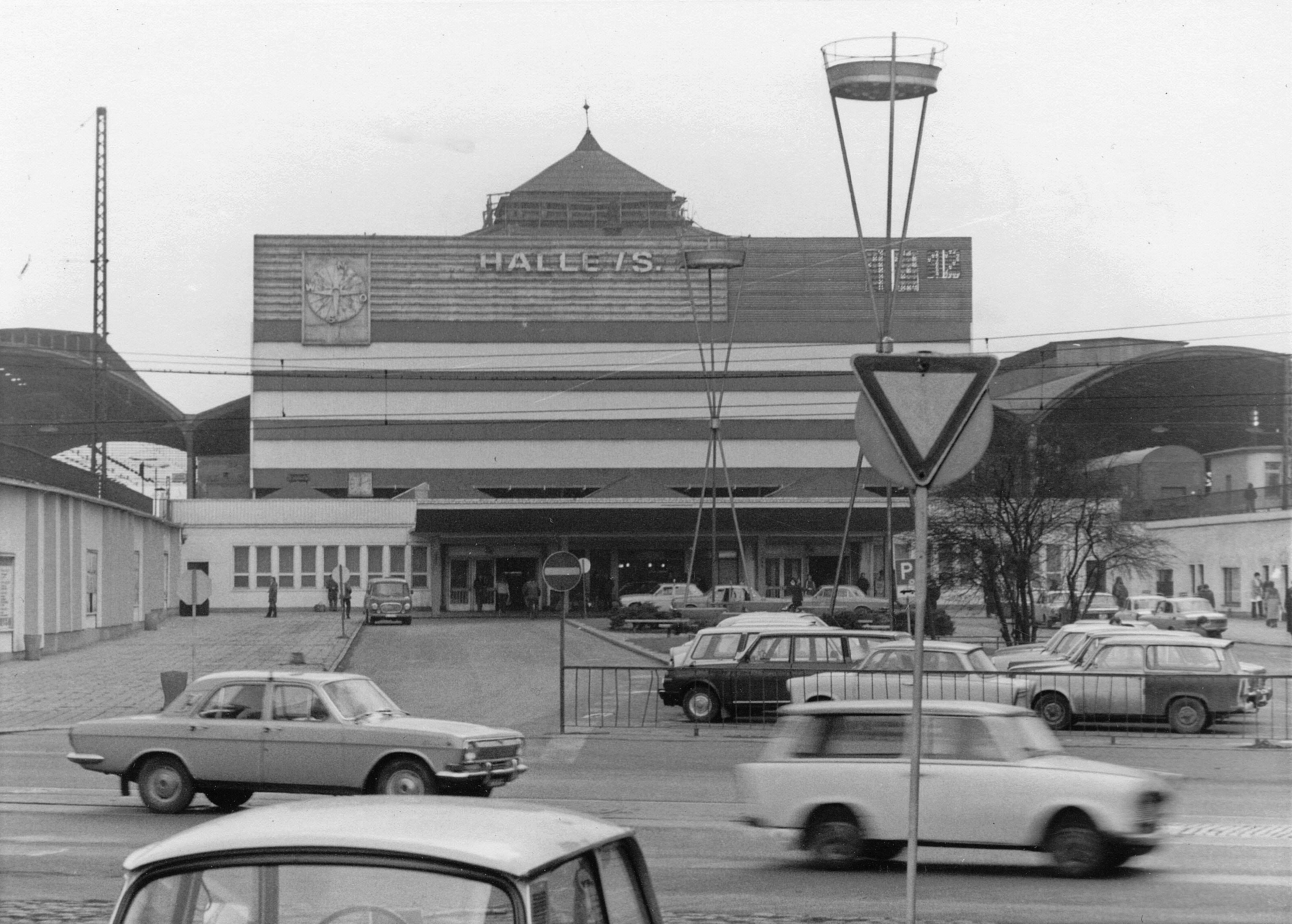 Halle (Saale) Hbf. noch mit alter Vorhangfassade, Fotoscan, Kleinbildtele 80 mm